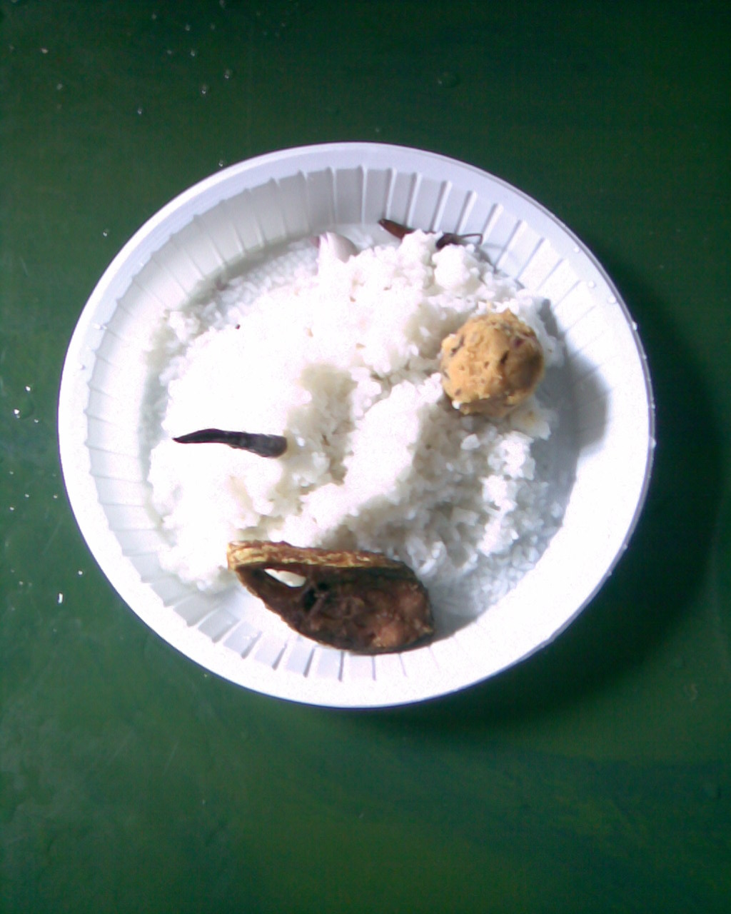 ঐতিহ্য, সংস্কৃতি আর উৎসবের মিলন - বৈশাখ